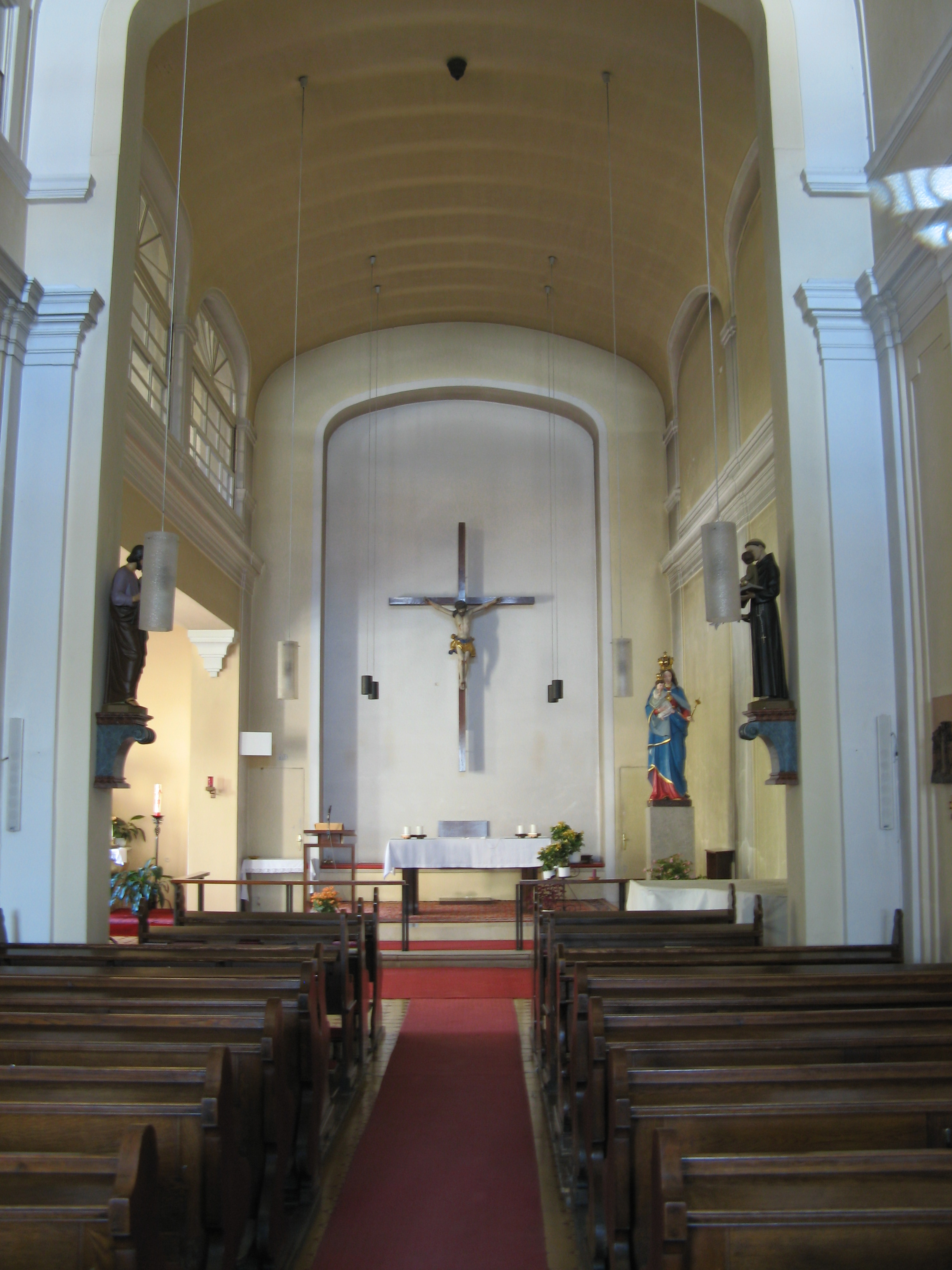 Innenraum der Klosterkirche der Kreuzschwestern in Wien-Meidling (1904/05)